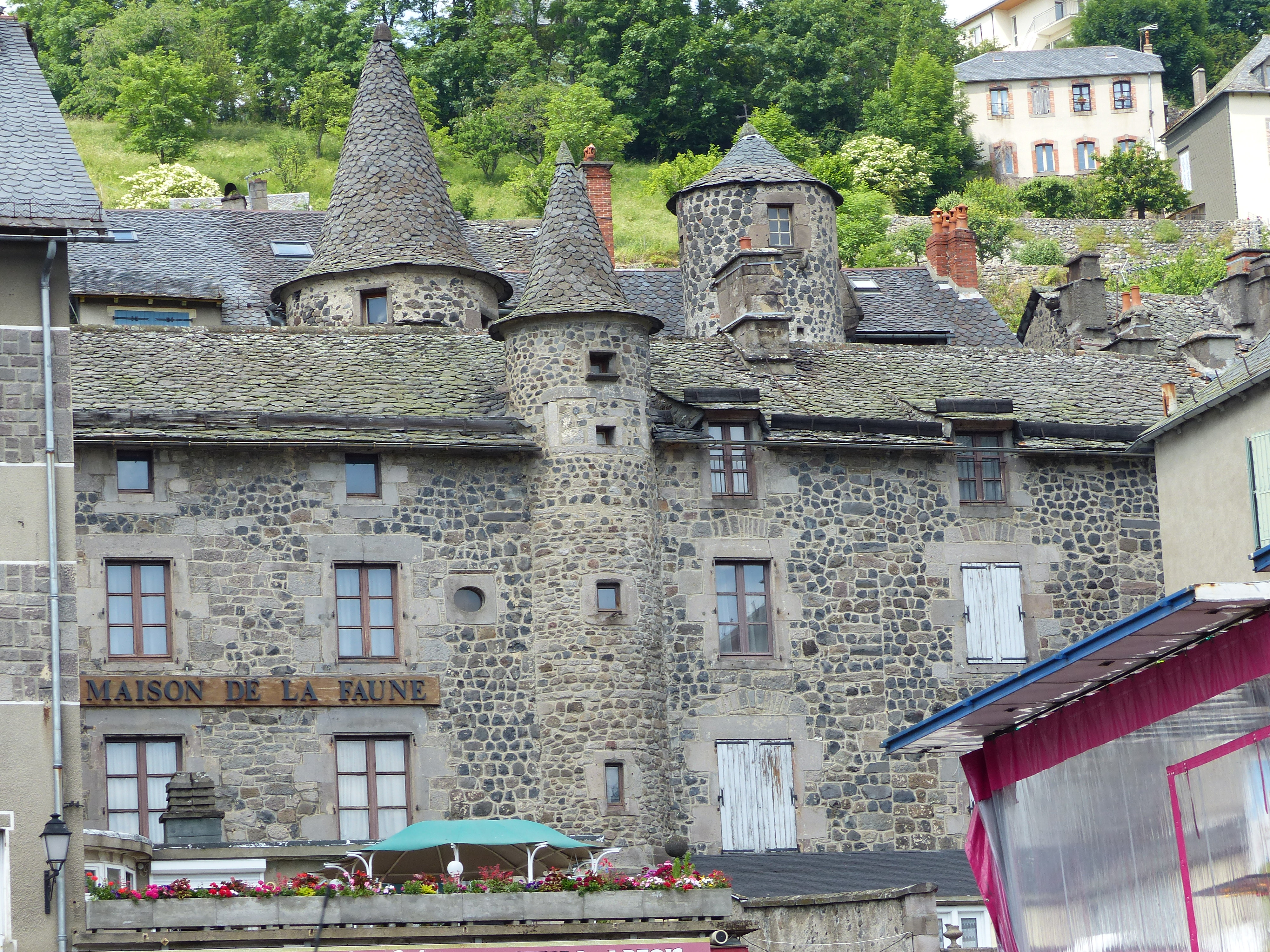 Maison